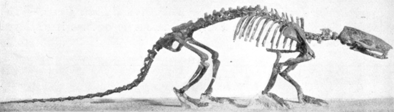 Metacheiromys tatusia skeleton.